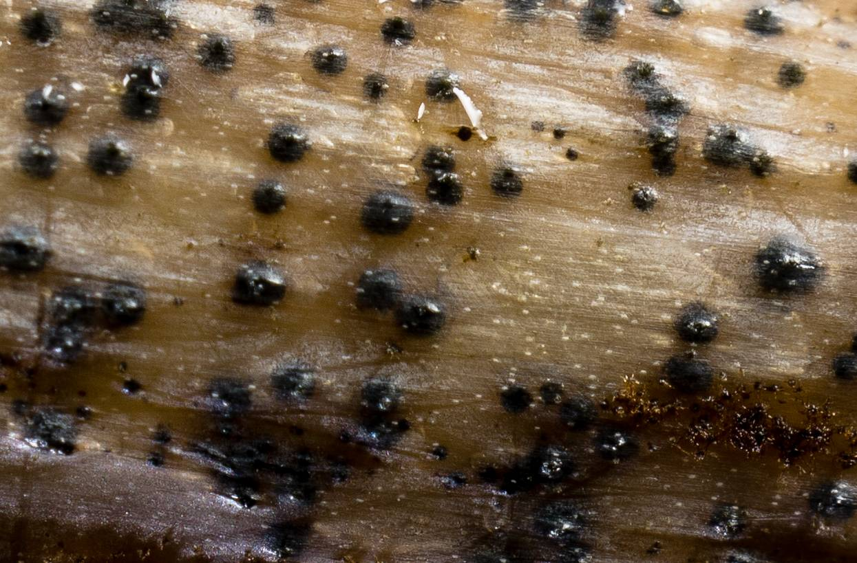 Pleospora herbarum infettante una pianta